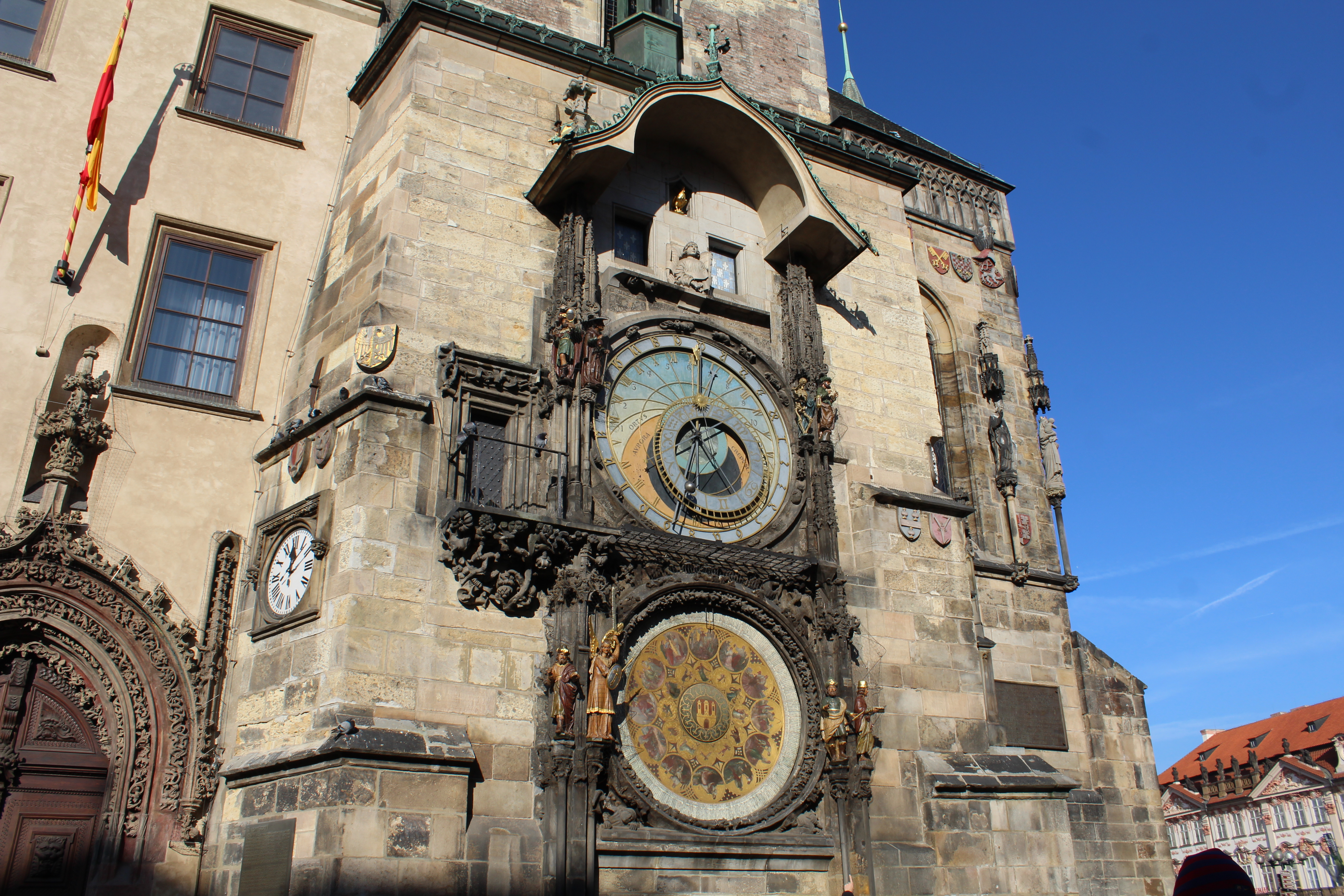 Horloge astronomique de Prague.